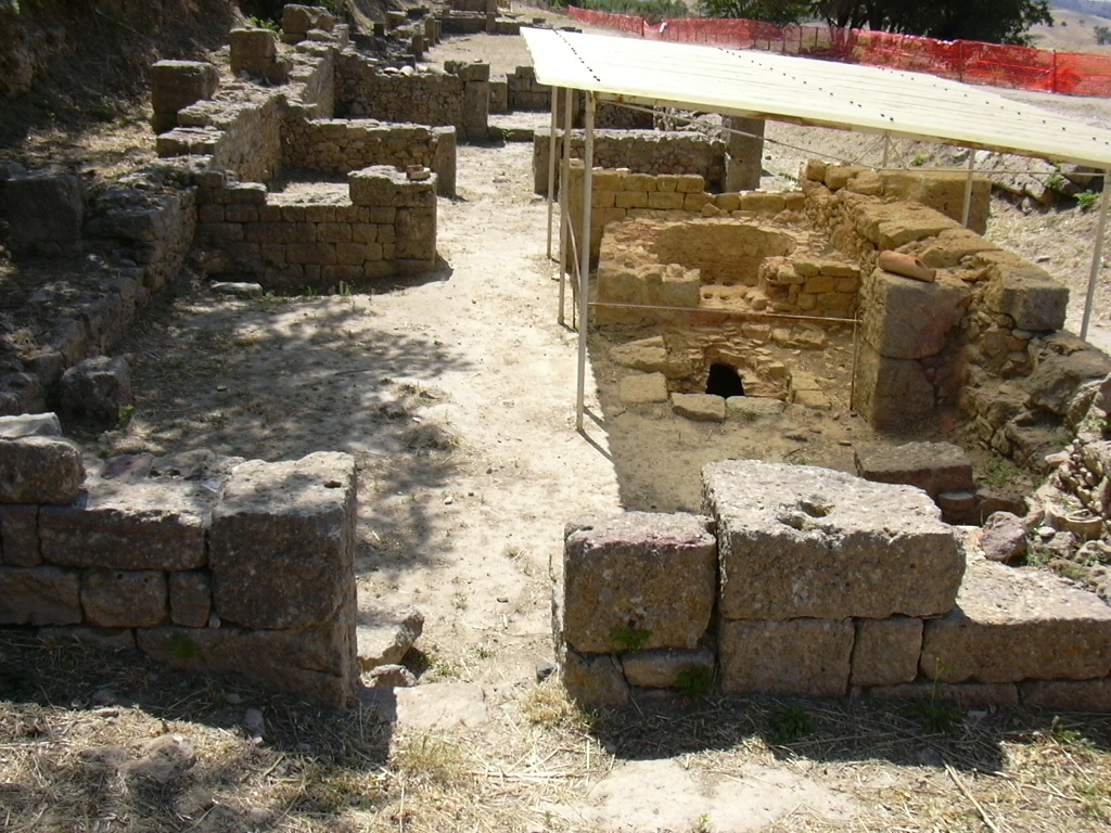 Morgantina:i granai, al loro interno si trova una fornace ben mantenuta